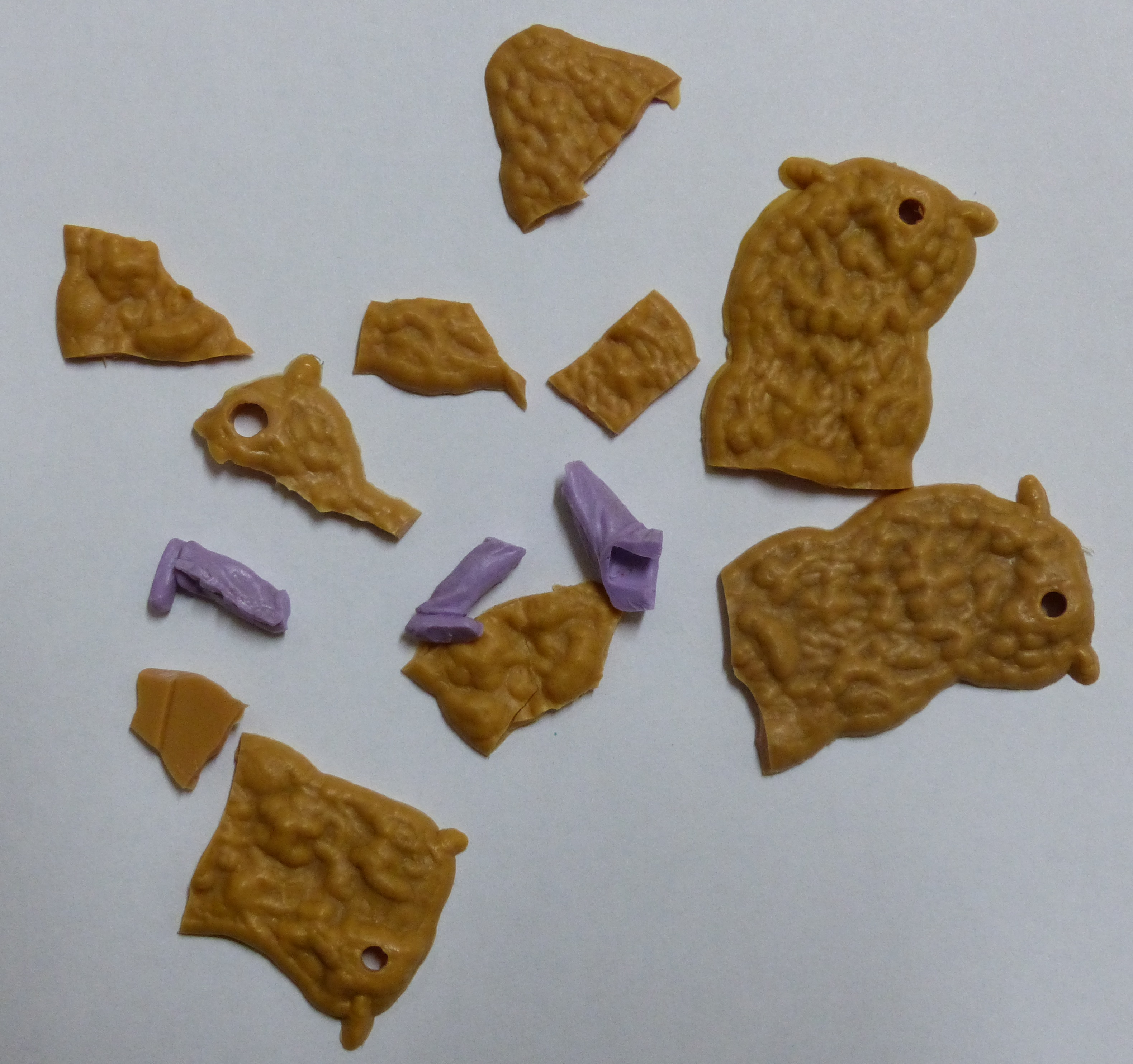 Kunststofffigur der Firma Timpo Toys